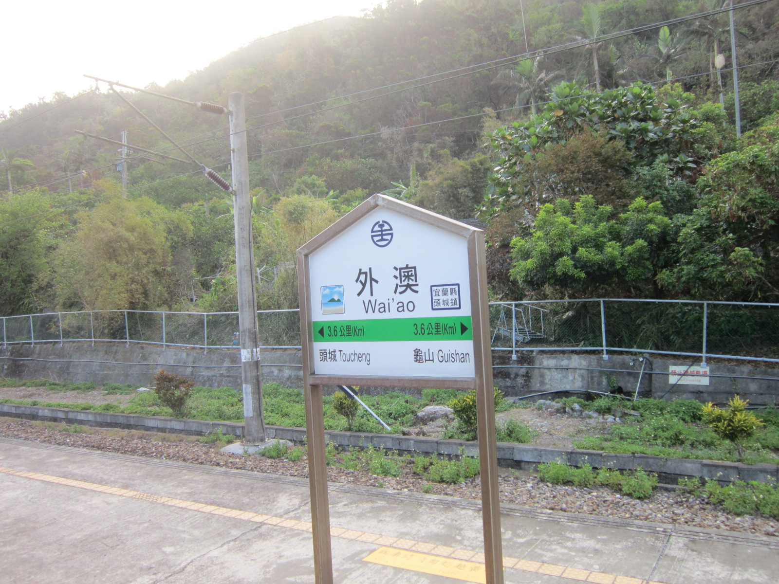 臺灣鐵路管理局外澳車站月台上的前後站距說明版